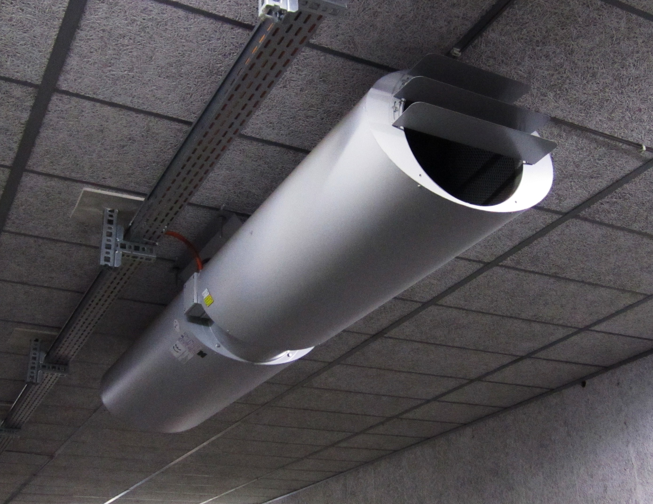 Strahlventilator in einem Parkhaus. Der Ventilator ist etwa zwei Meter lang.